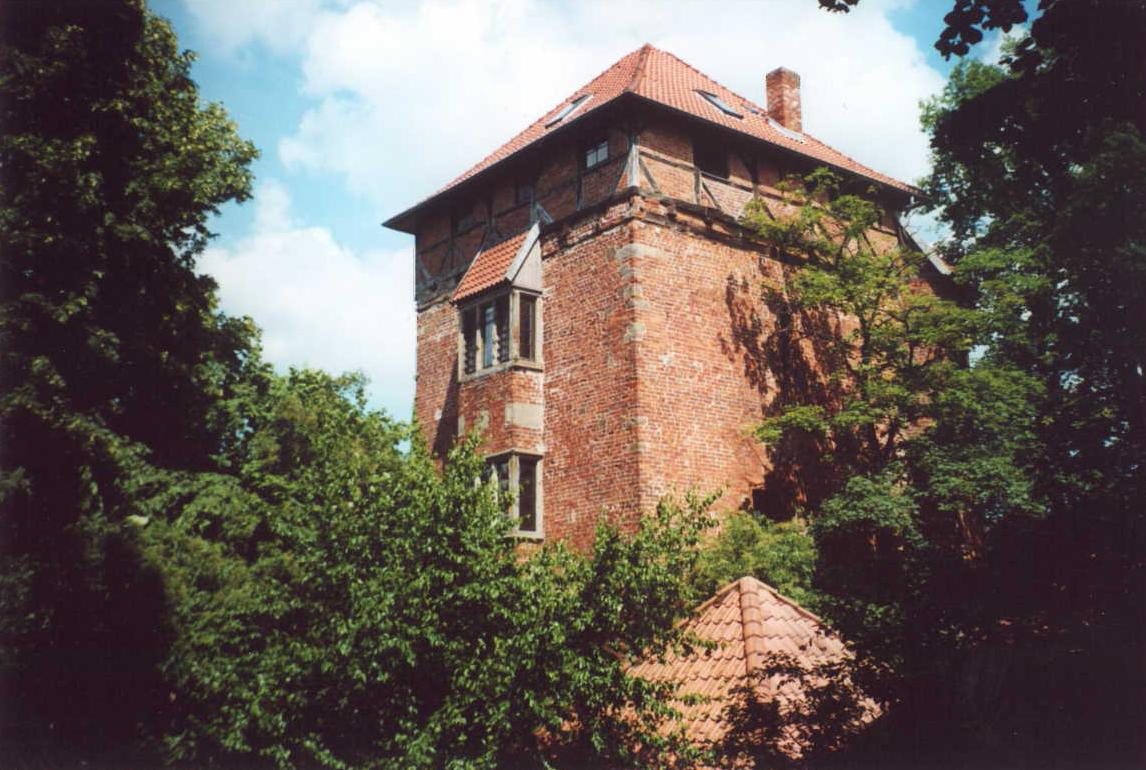 Stockturm in Nienburg/Weser, Niedersachsen, Deutschland